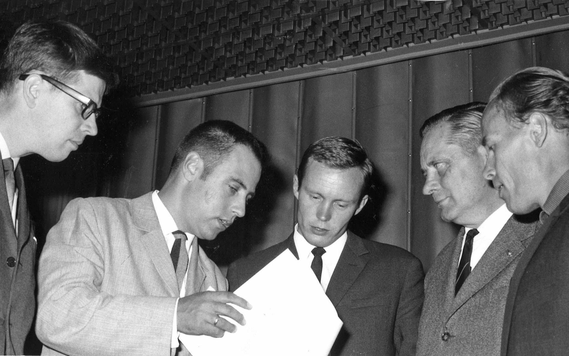 Naapurivisan kilpailijoita: Erkki Holvikivi (vas.), Timo T. Kaukonen, virolainen kysymysten laatija toimittaja Vello Kallaste, Esko Kivikoski ja Keijo Virtamo